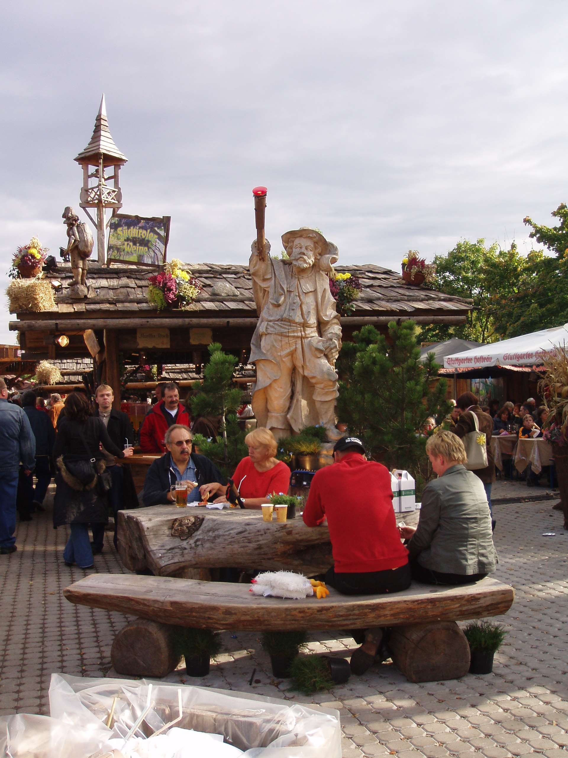 Cannstatter Volksfest 2008